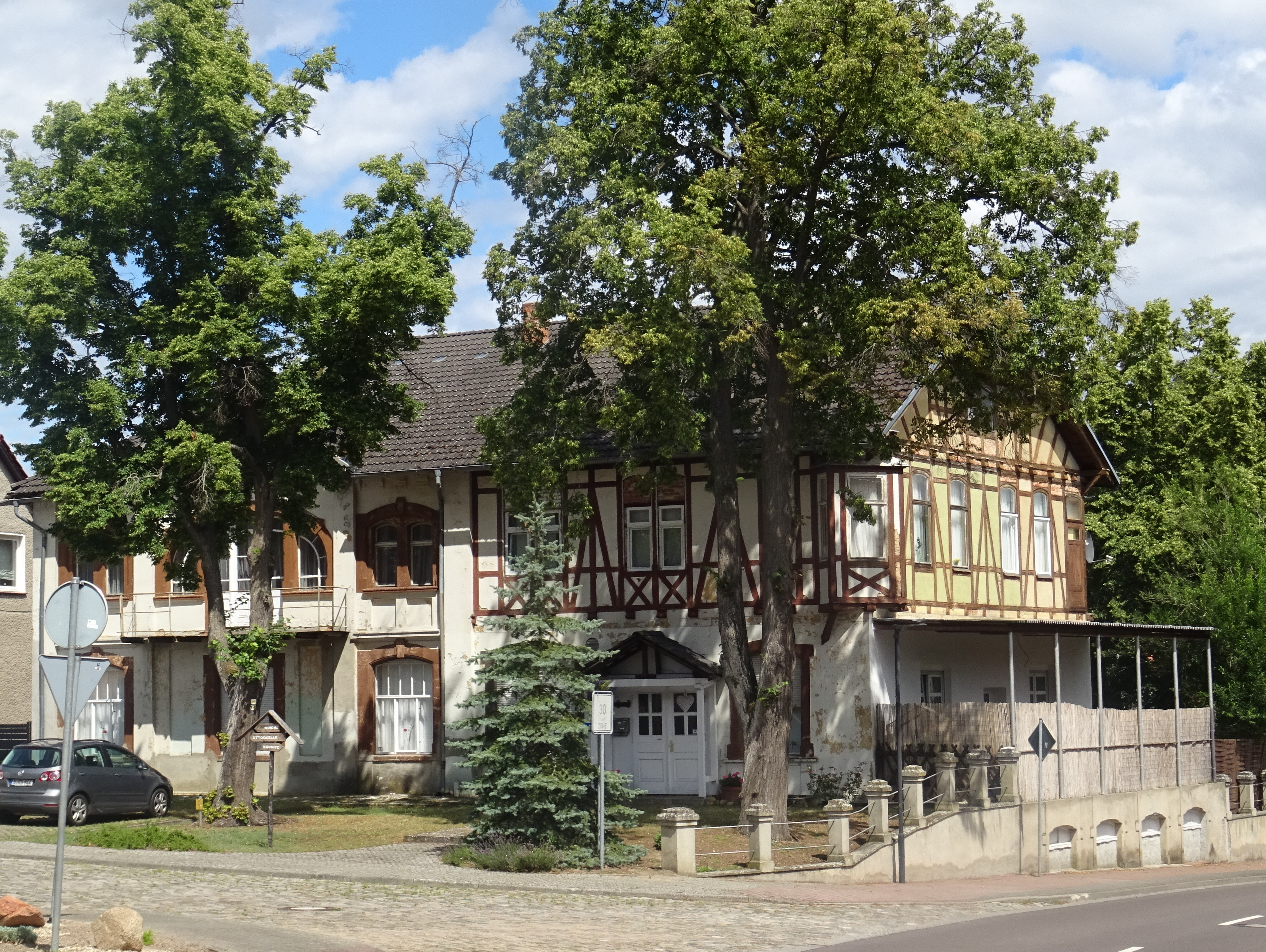 Magdeburgerforth, denkmalgeschützter früher Gasthof Zu den Drei Linden